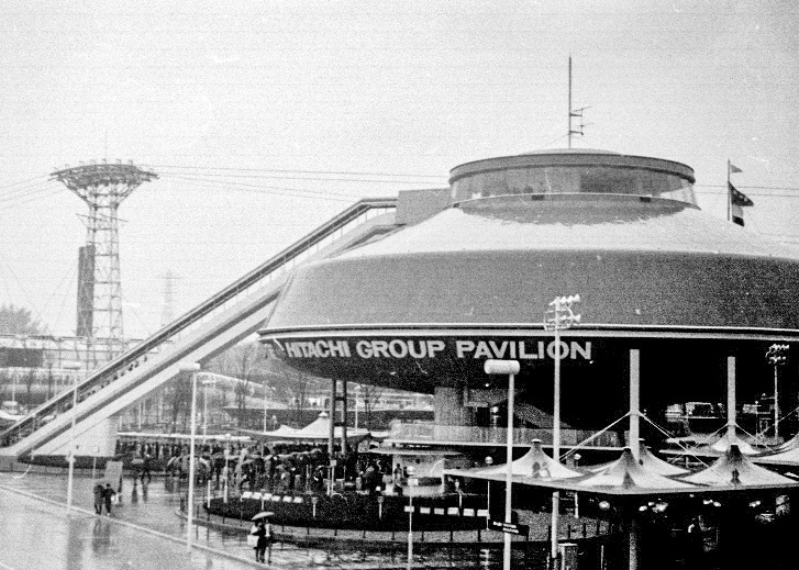 Osaka Expo 1970